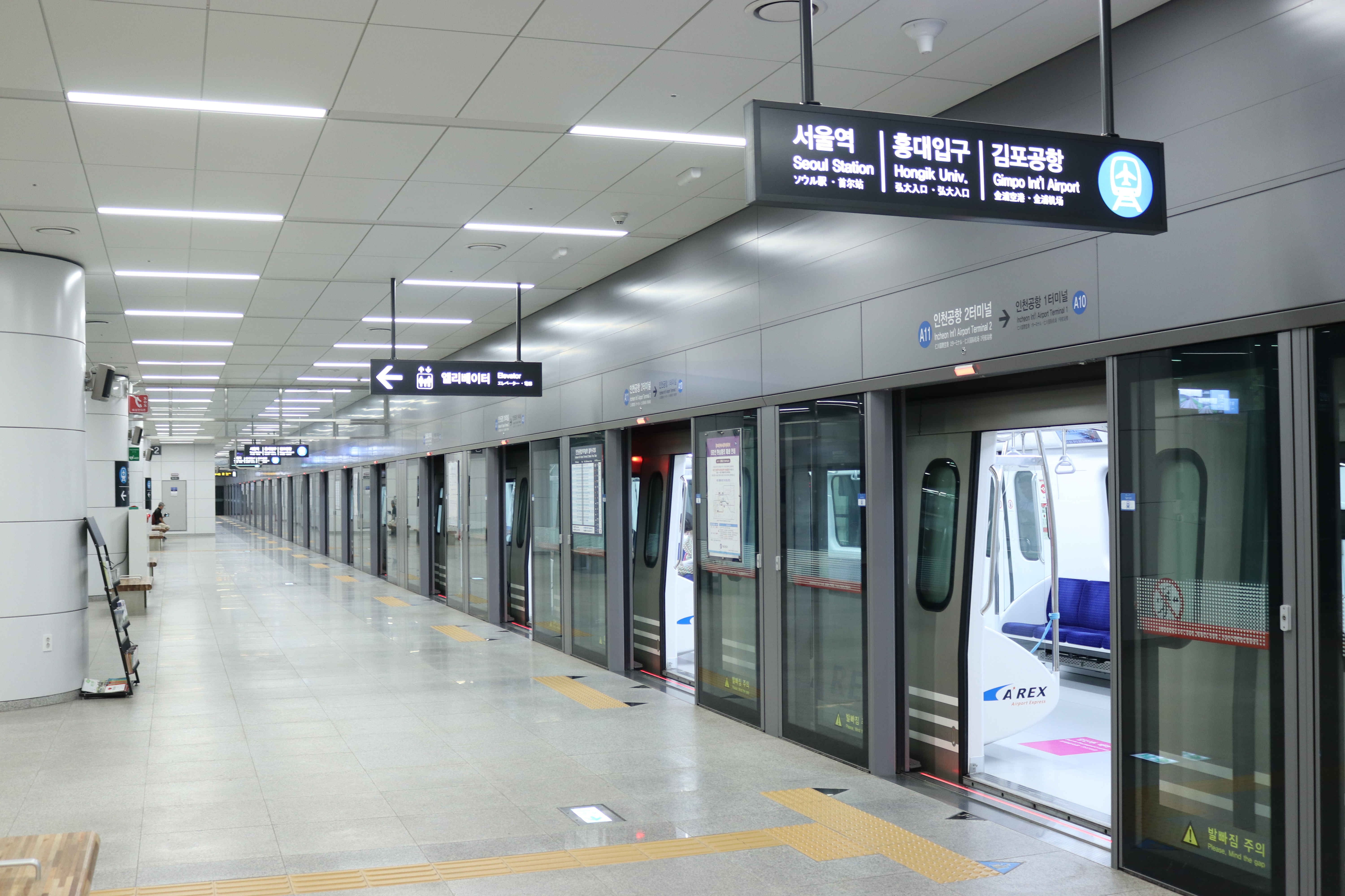 인천공항 2터미널역 승강장